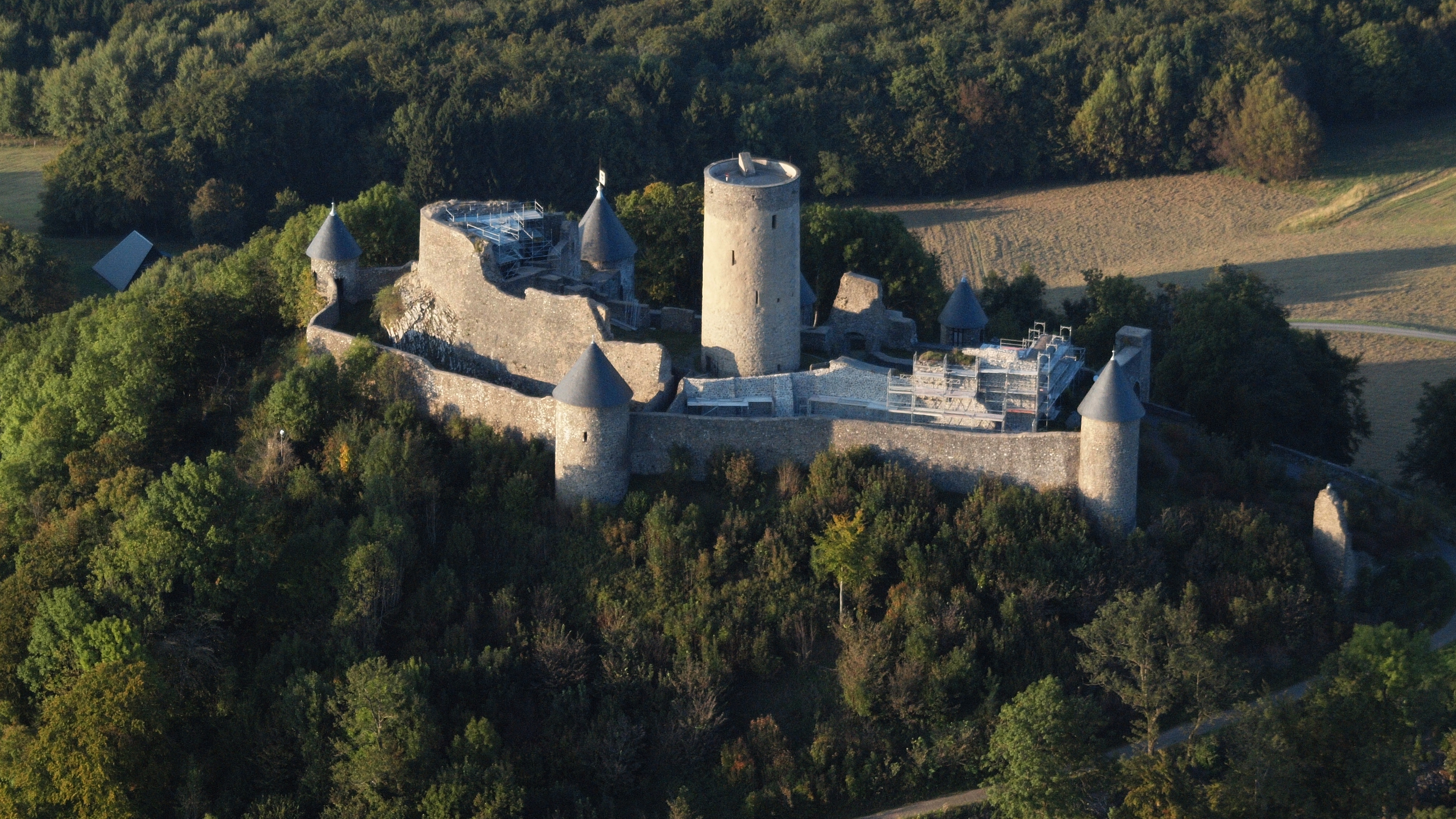 Nürburg bei Nürburg, Luftaufnahme